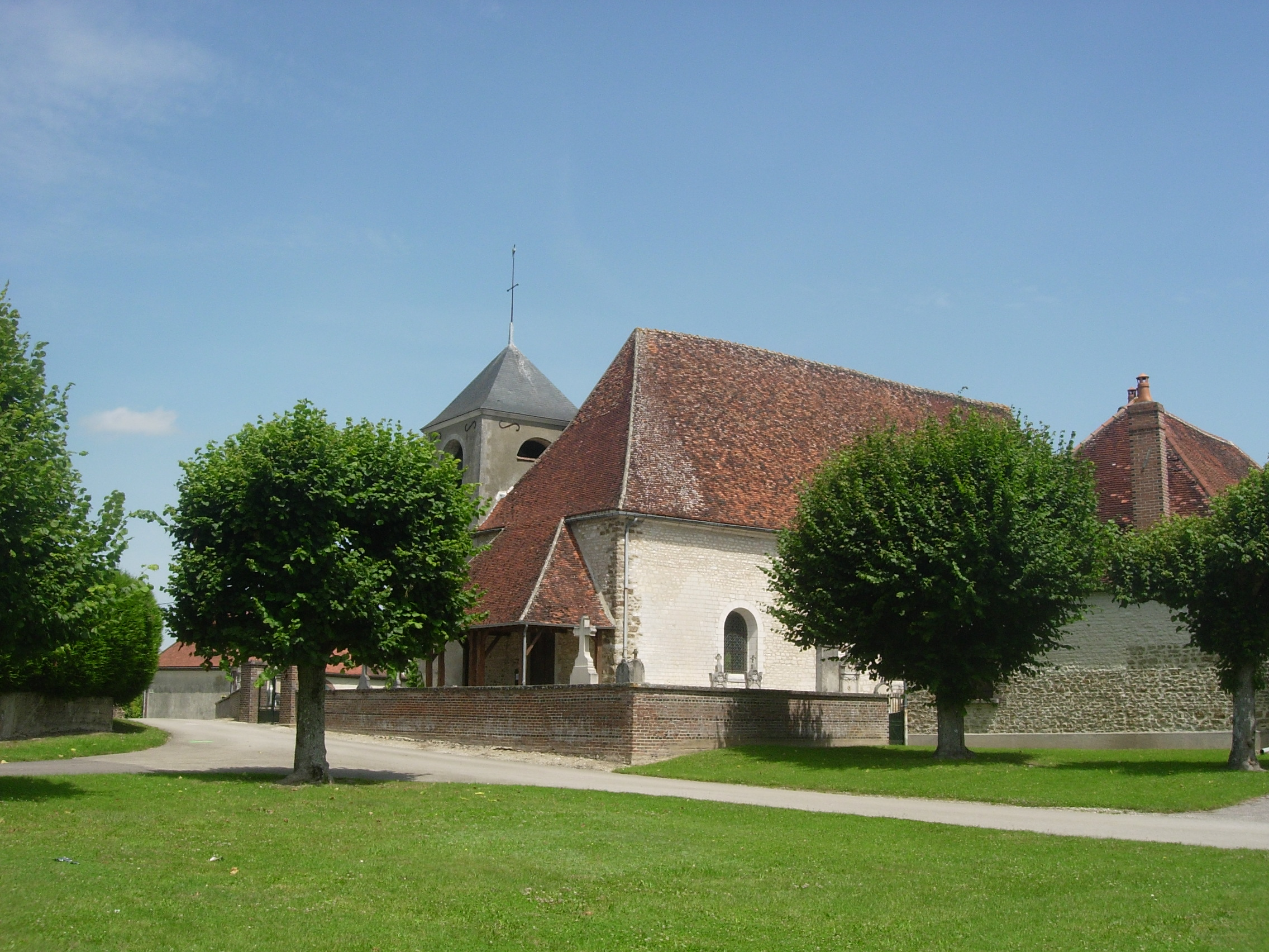 Église de Coursan-en-Othe (Aube, France).